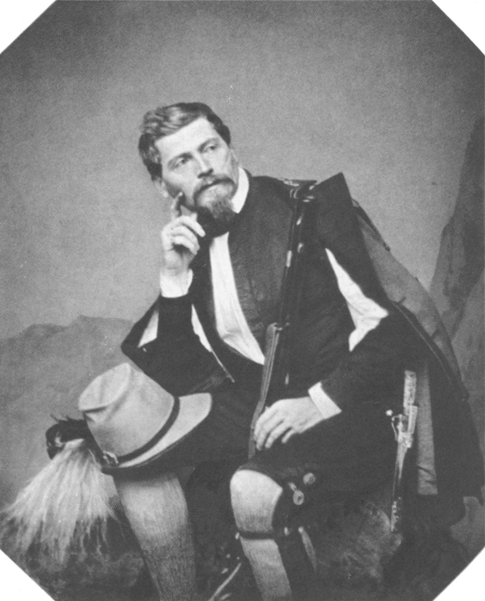 Ludwig Freiherr von der Tann (1815-1881), Hintergrund mit Aquarellfarben übermalt